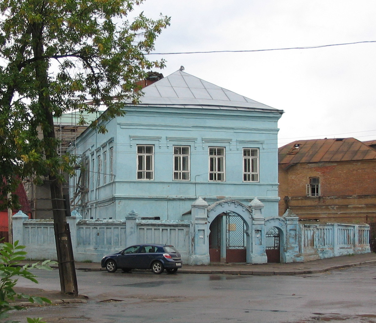 Голубая Мечеть (Казань) до восстановления минарета